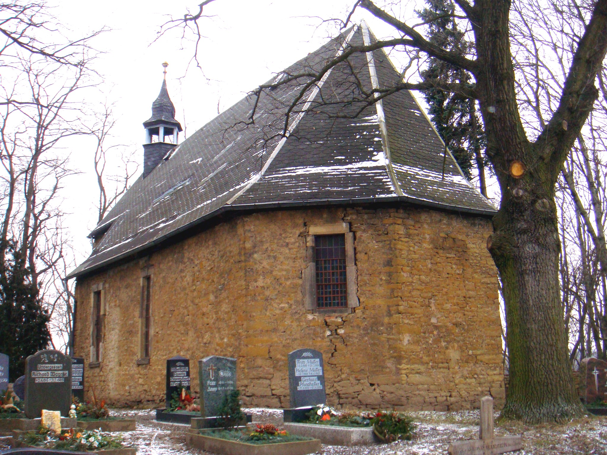 Evangelische Bergkirche von Weiden (Buttelstedt)